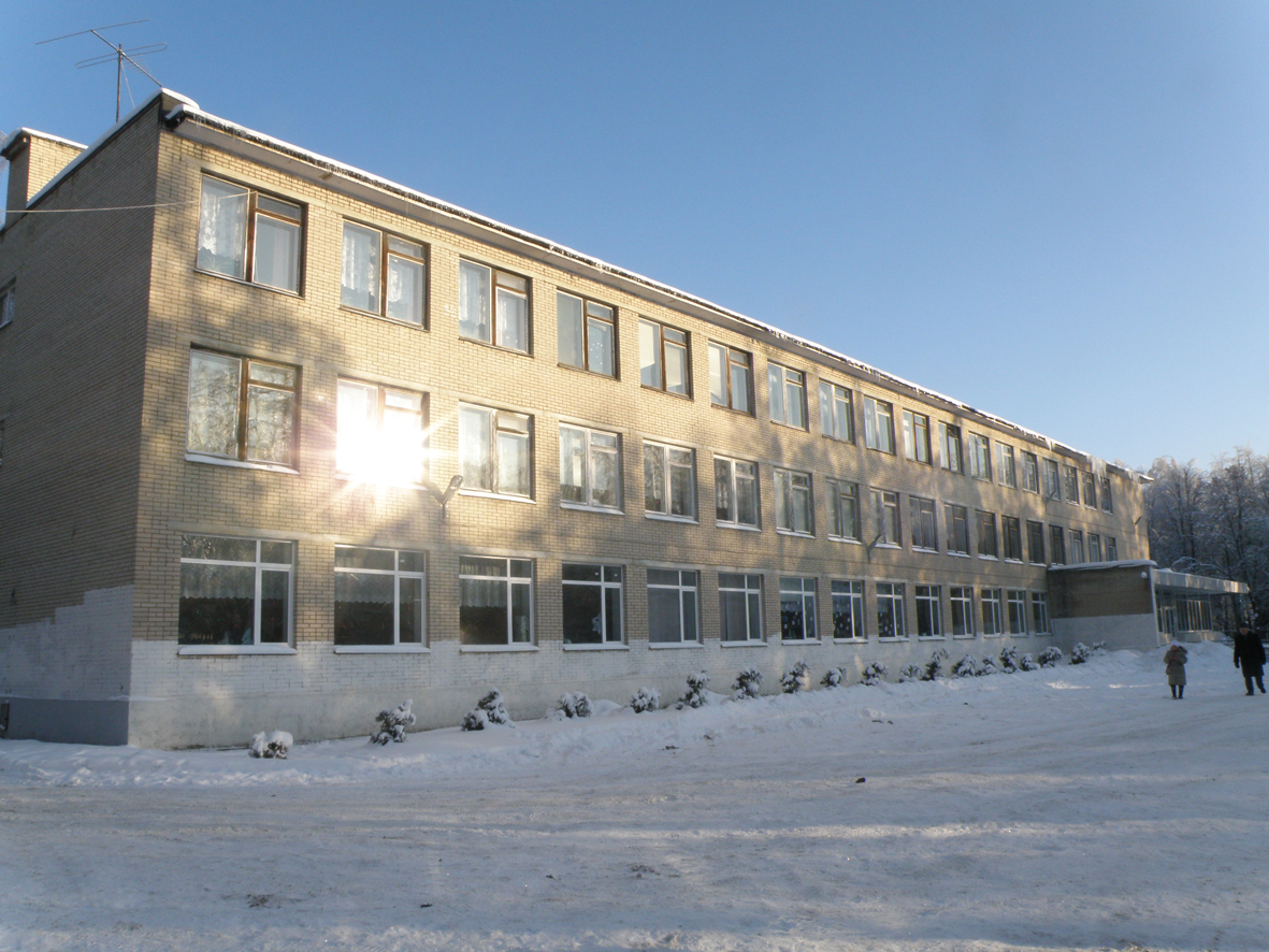 школа имени А. Н. Косыгина в посёлке Архангельском